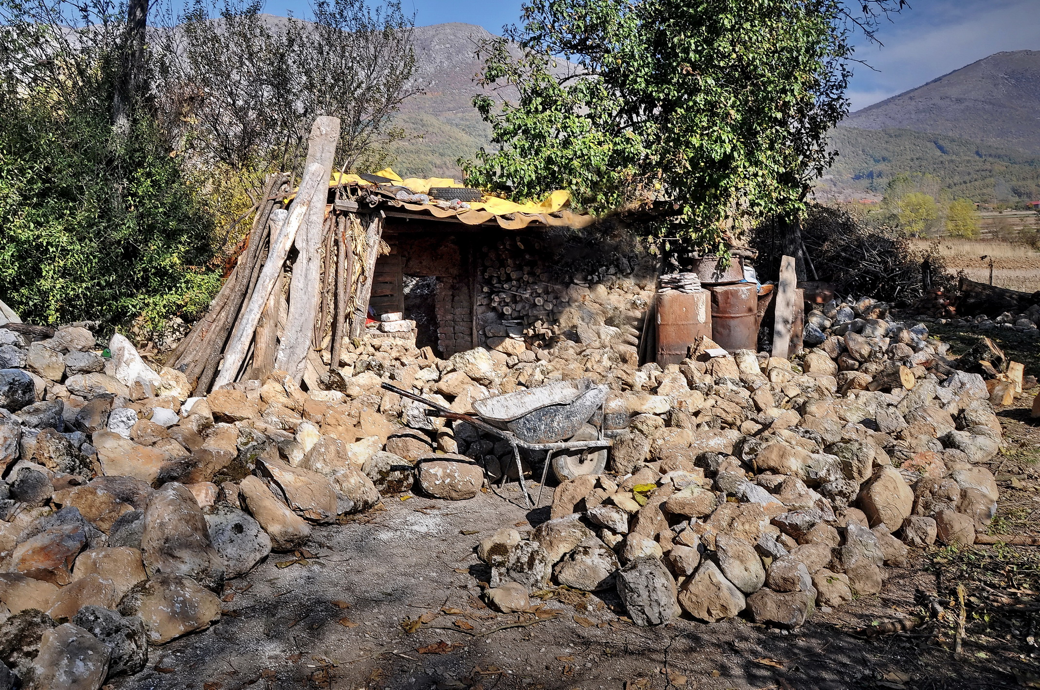 Srpski (latinica): Krečana u okolini Gornjeg Dušnika na Suvoj planini.